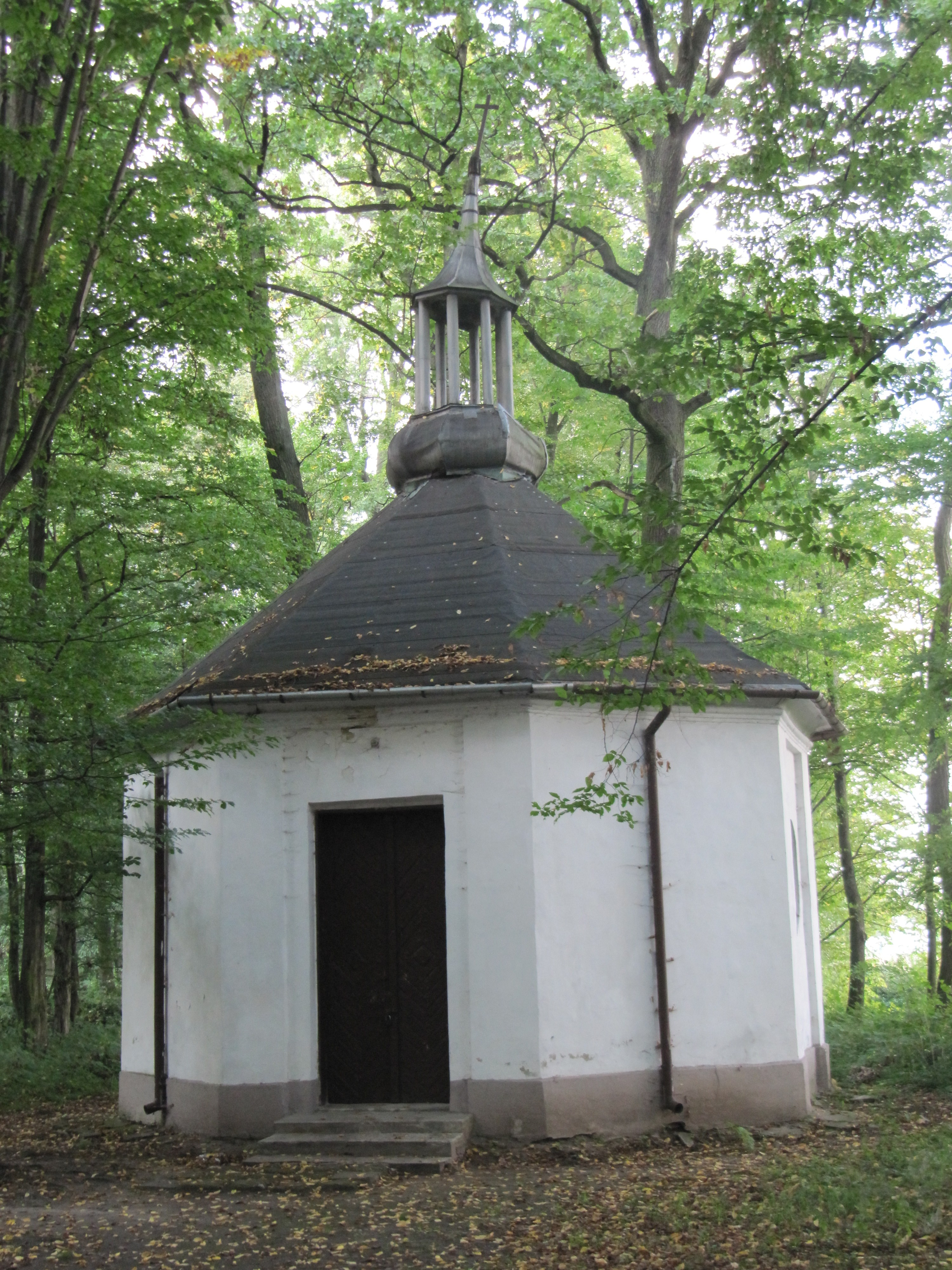 Kaplica podworska - widok od frontu Skrzydlów, Kłomnice